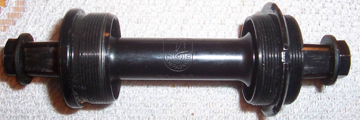 Support rowerowy 70-SSG firmy Campagnolo.